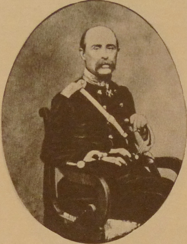 Georgian poet Vakhtang Orbeliani